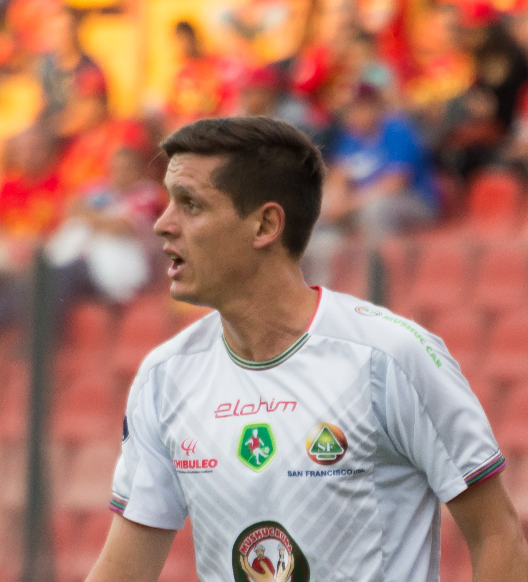 Esteban Rivas, Unión Española v Mushuc Runa, Estadio Santa Laura, Independencia, Santiago, Región Metropolitana, Chile.